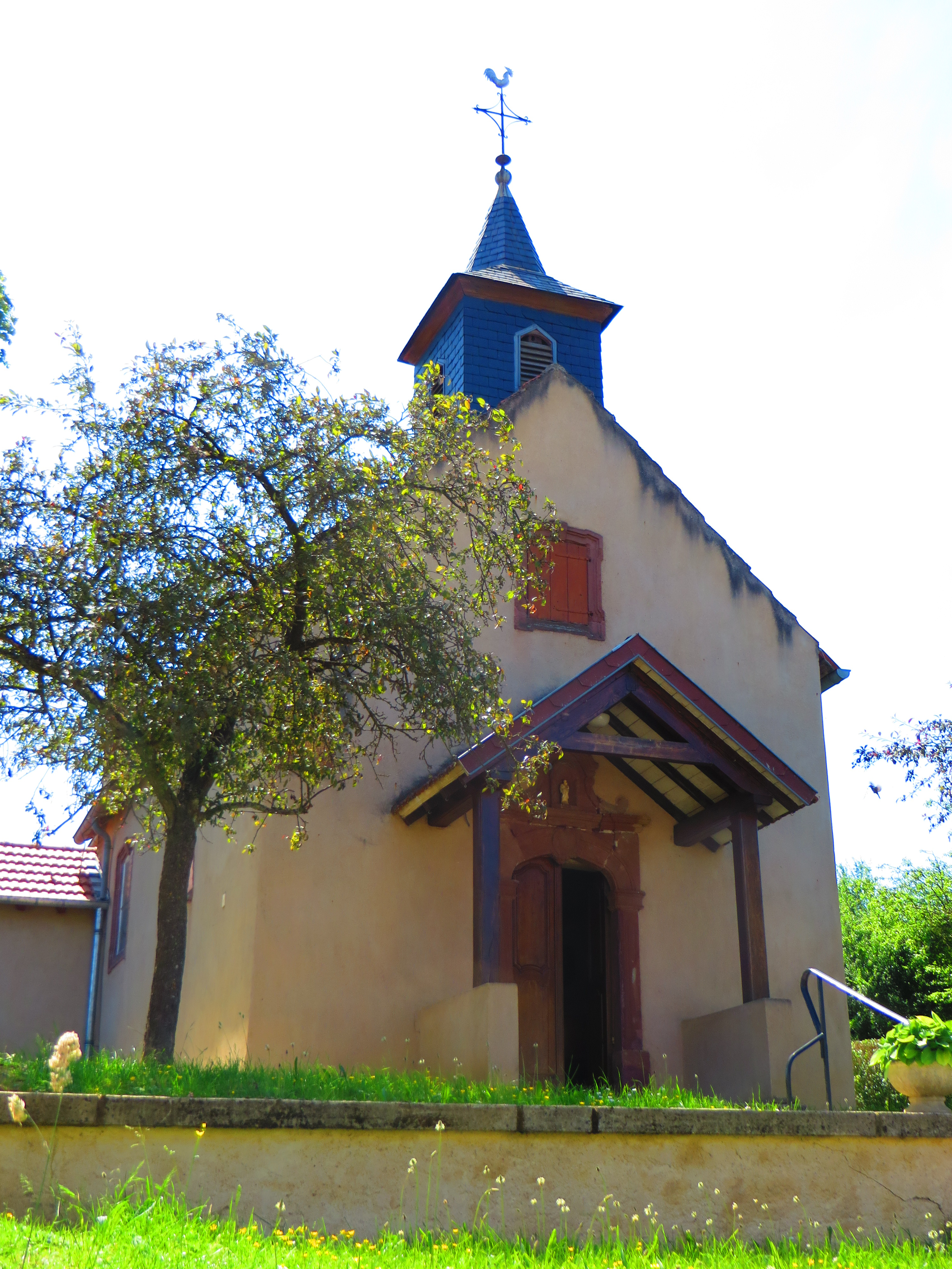 Grindorff eglise